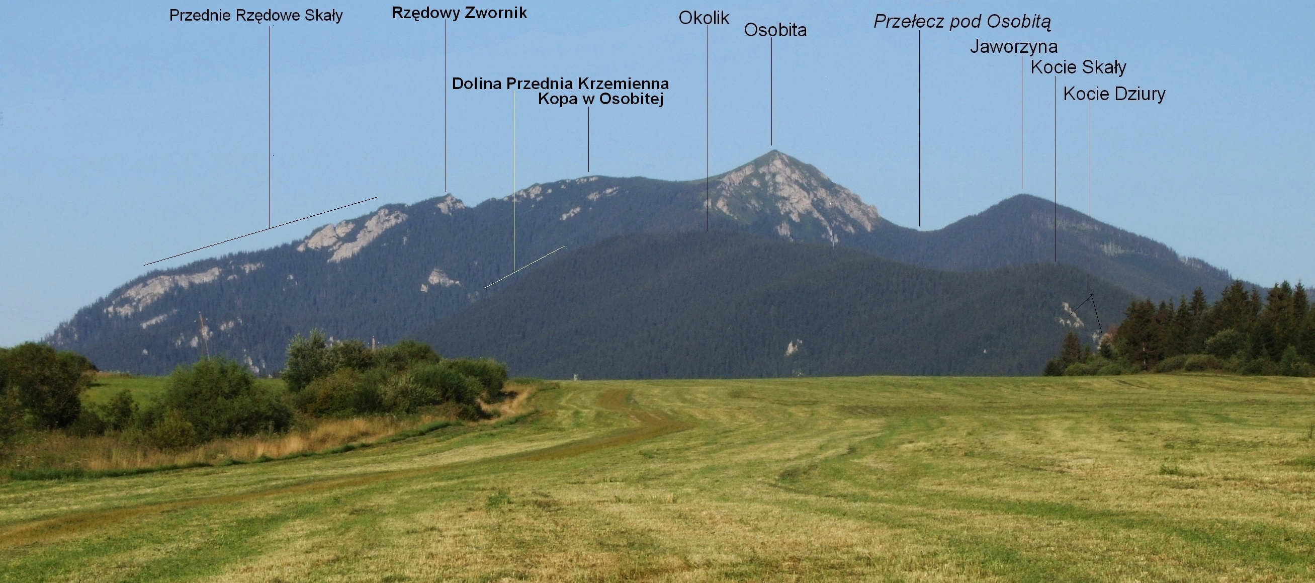 Widok na masyw Osobitej z wału Między Bory